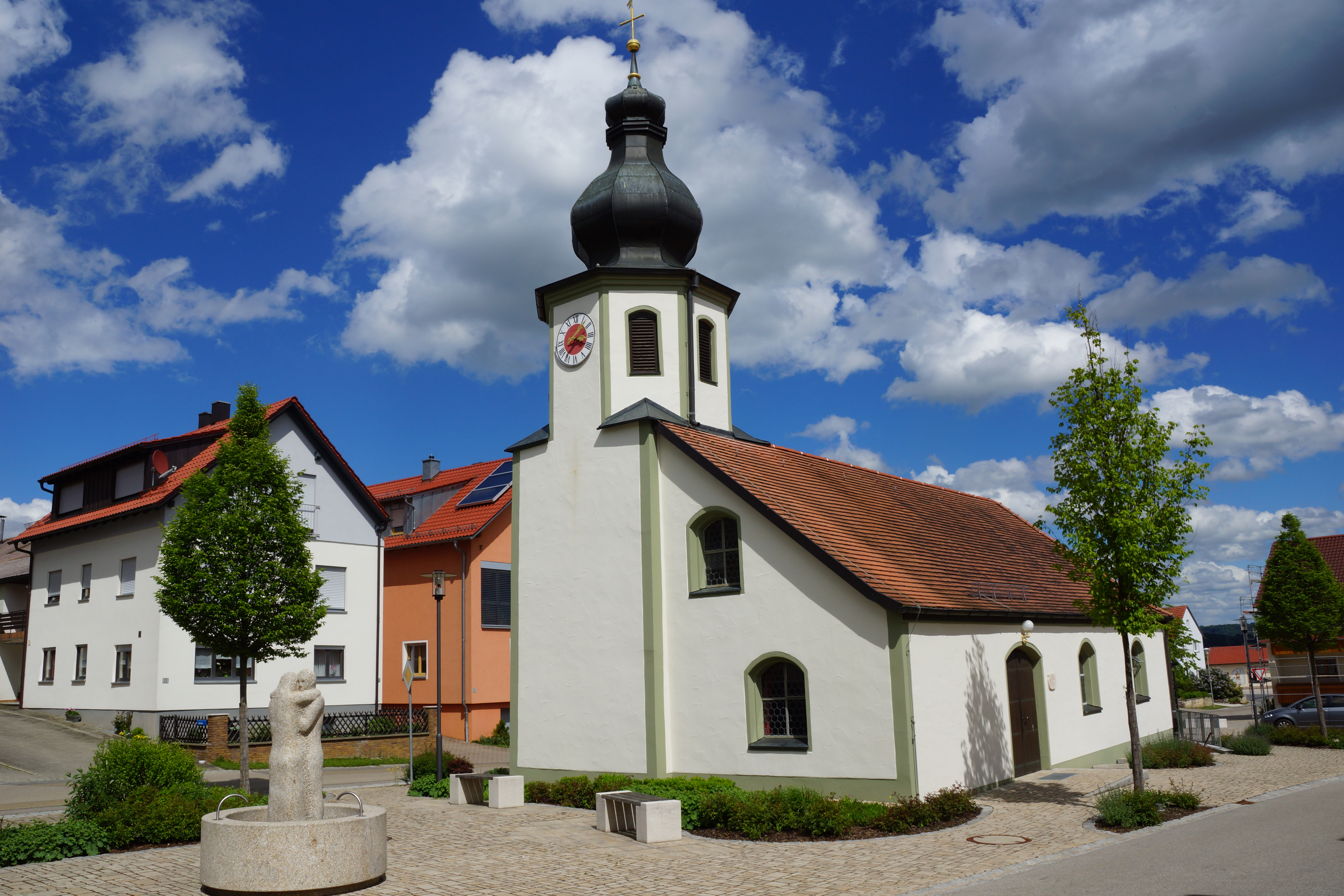 Die katholische Filialkirche zur Heiligen Dreifaltigkeit in Röckersbühl, Kreis Neumarkt in der Oberpfalz